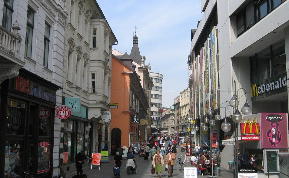 Čopova street, Ljubljana photo:Ziga 21:22, 27 April 2006 (UTC)